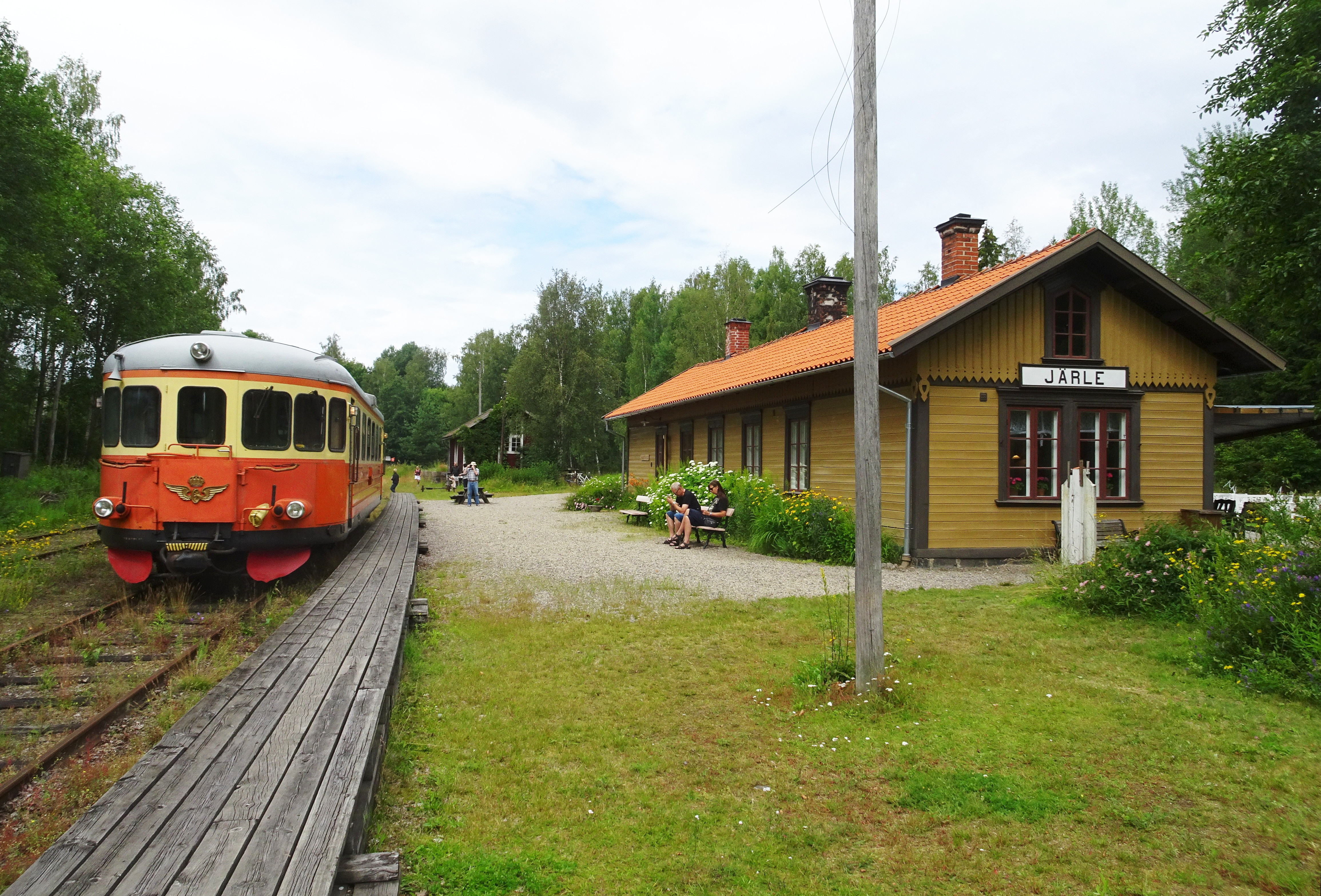 Järle stationshus